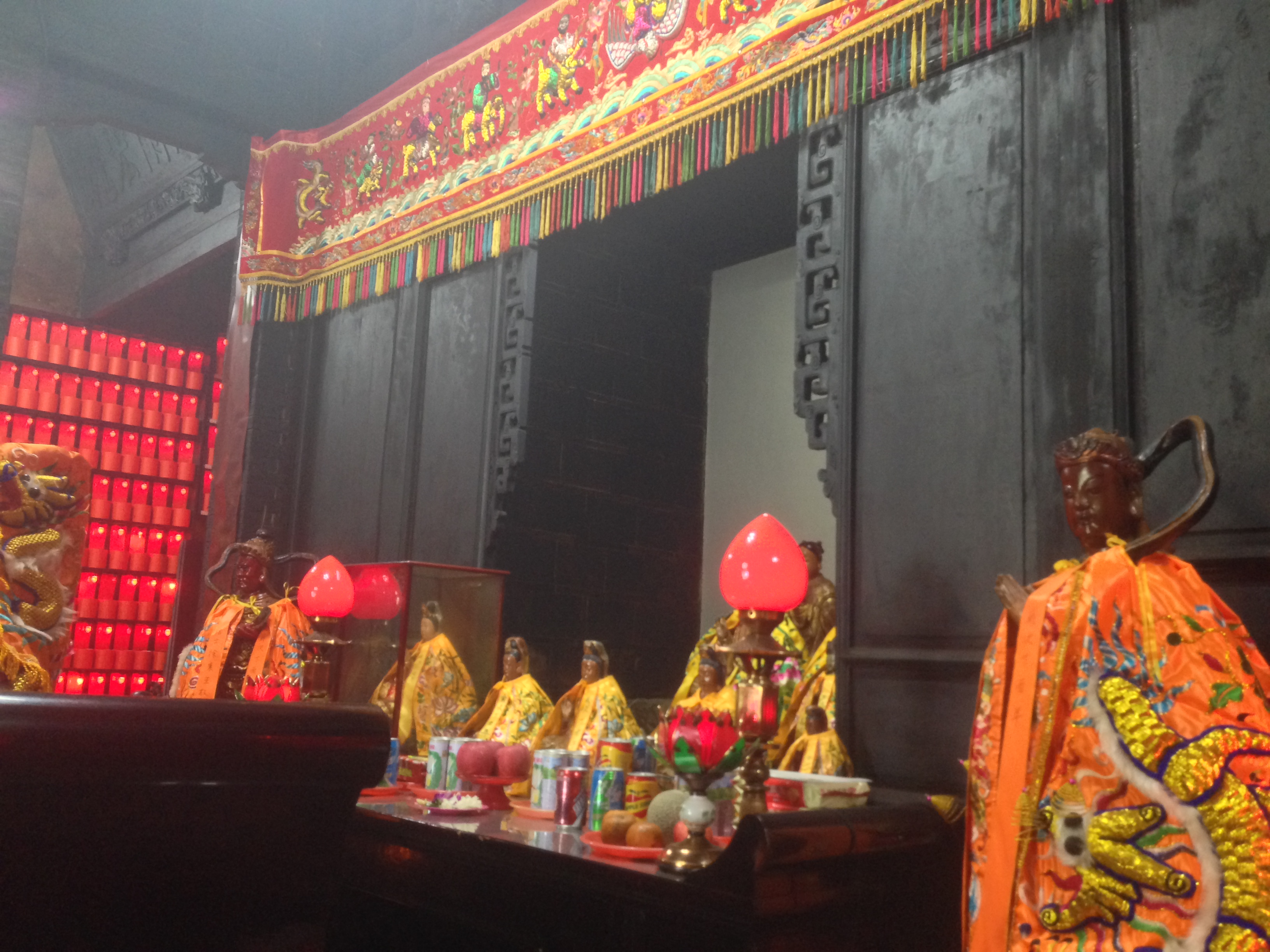 中文（台灣）: 新竹金山寺神像